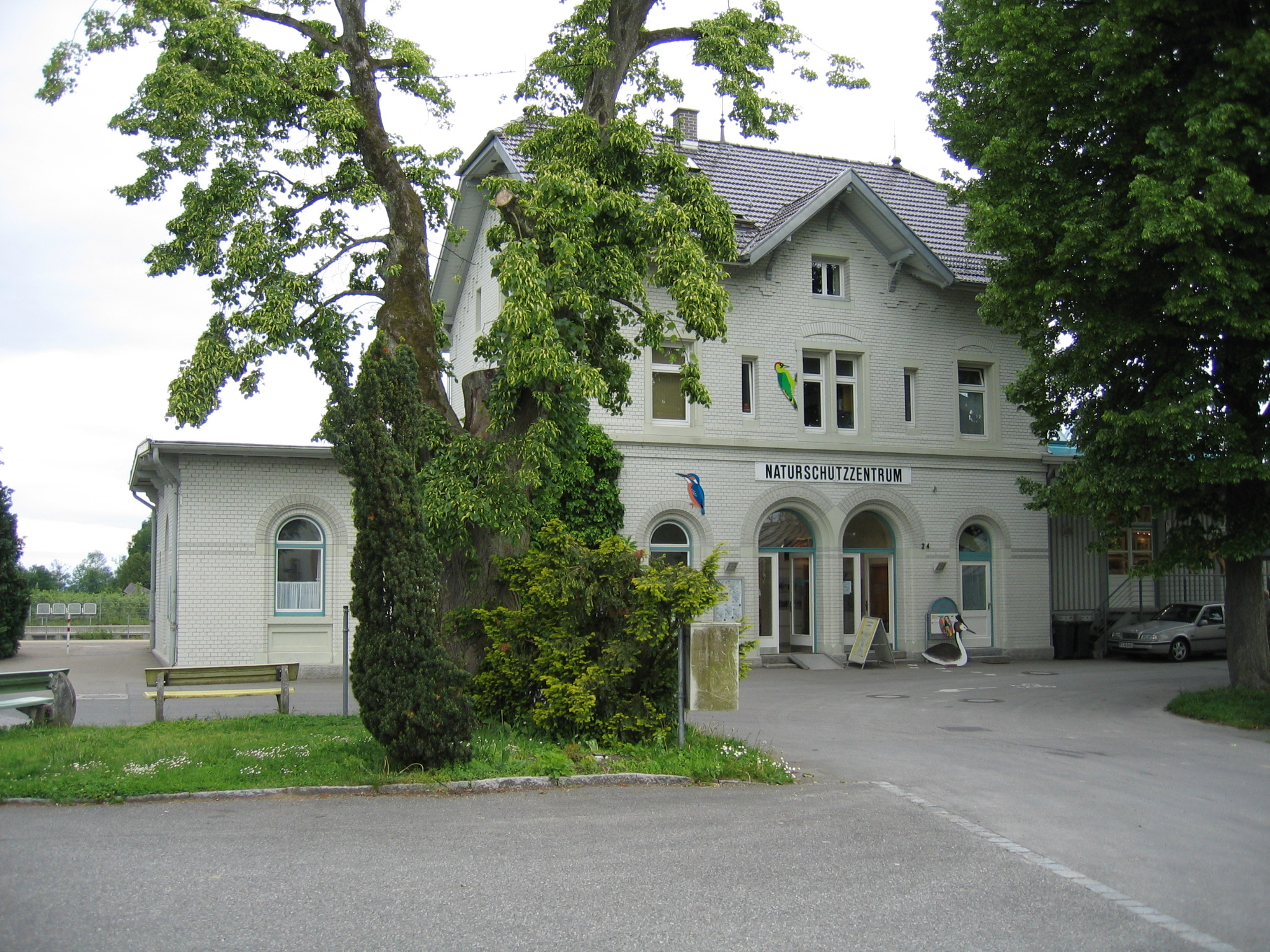 Ehemaliges Bahnhofsgeäude in Eriskirch; heutige Nutzung durch die 1992 gegründete gemeinnützige Stiftung "Naturschutzzentrum Eriskirch".